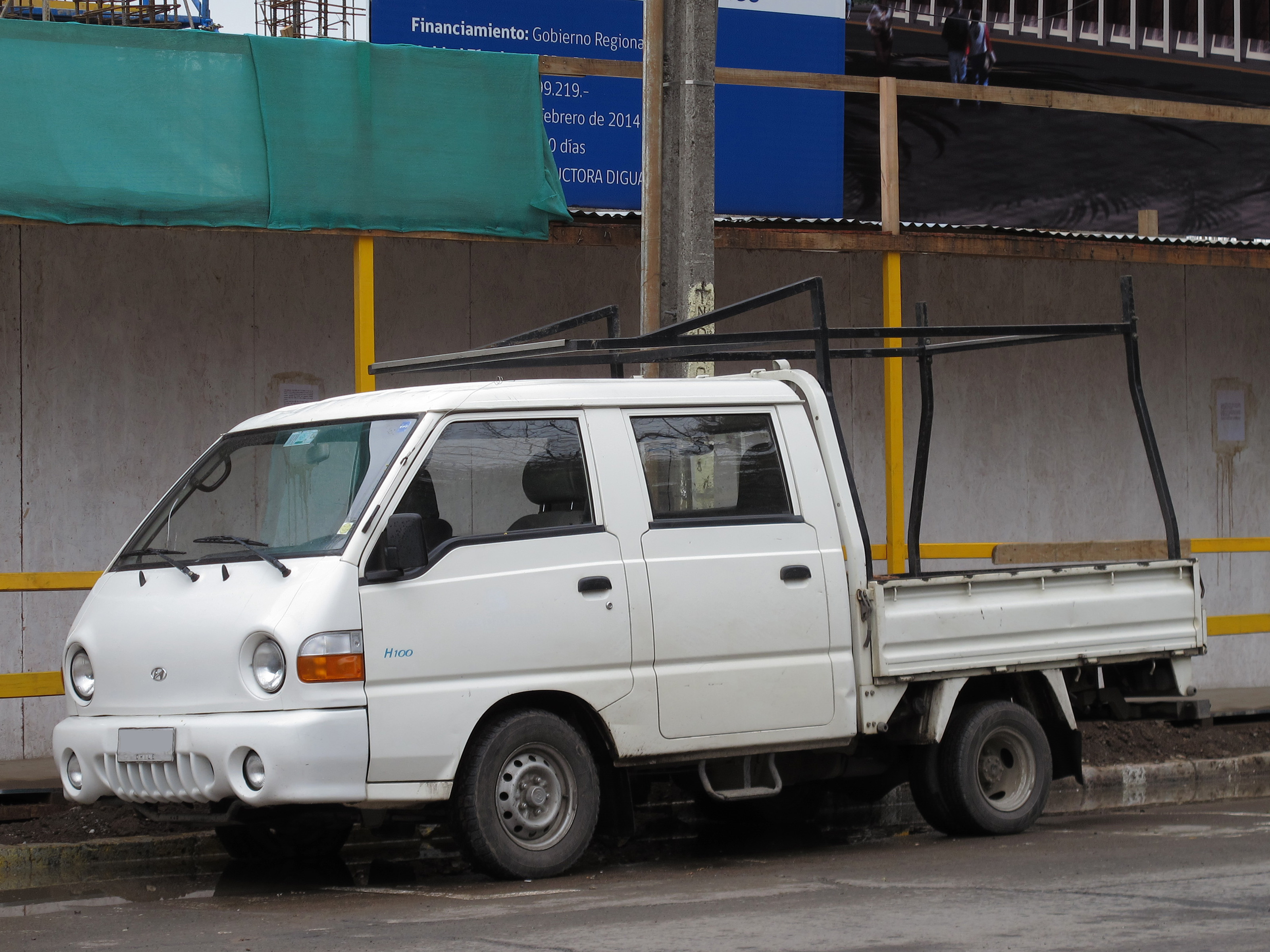 Hyundai H100 Porter Crew Cab 2000